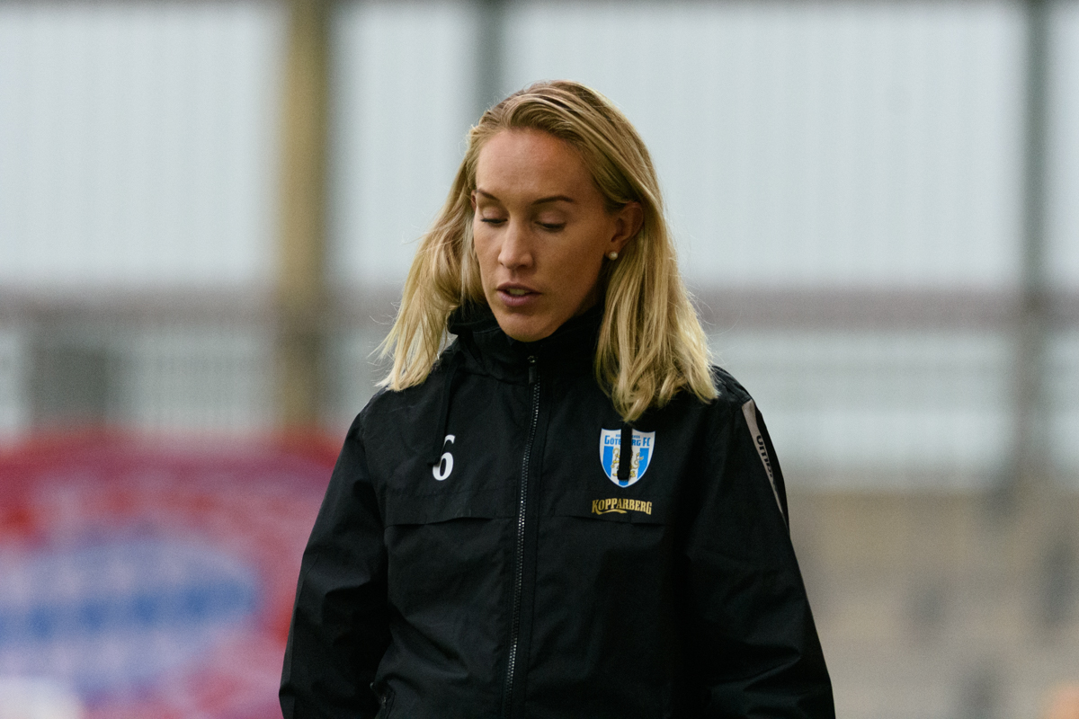 Julia Roddar at FC Bayern vs Göteborg FC